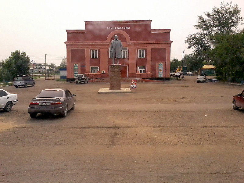 Памятник Ленину перед Домом культуры в Кулунде.